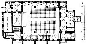 Grunewaldkirche nach der Einweihung 1904, Grundriss